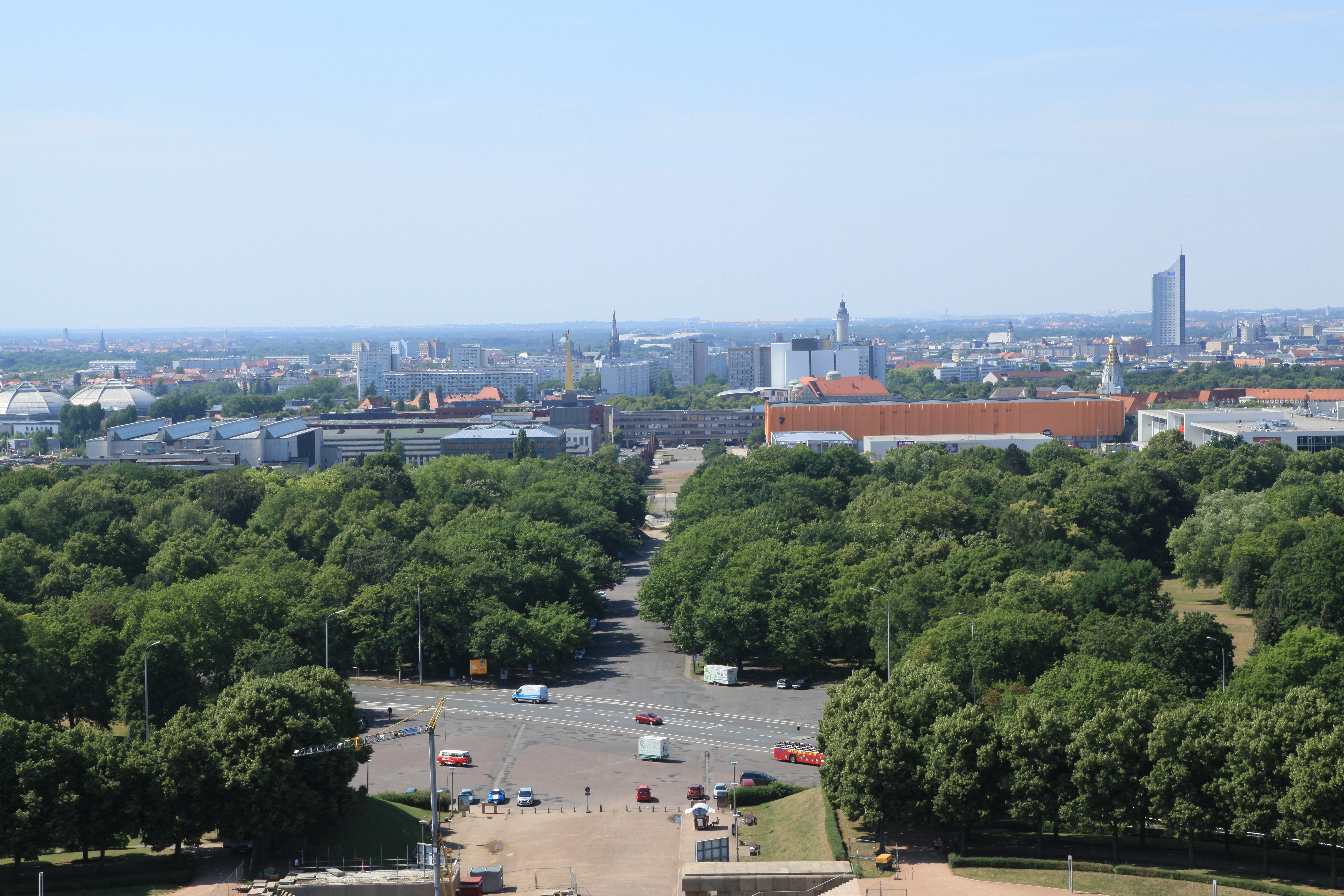 Blick vom Völkerschlachtdenkmal über An der Tabaksmühle und Wilhelm-Külz-Park zur Innenstadt von Leipzig.